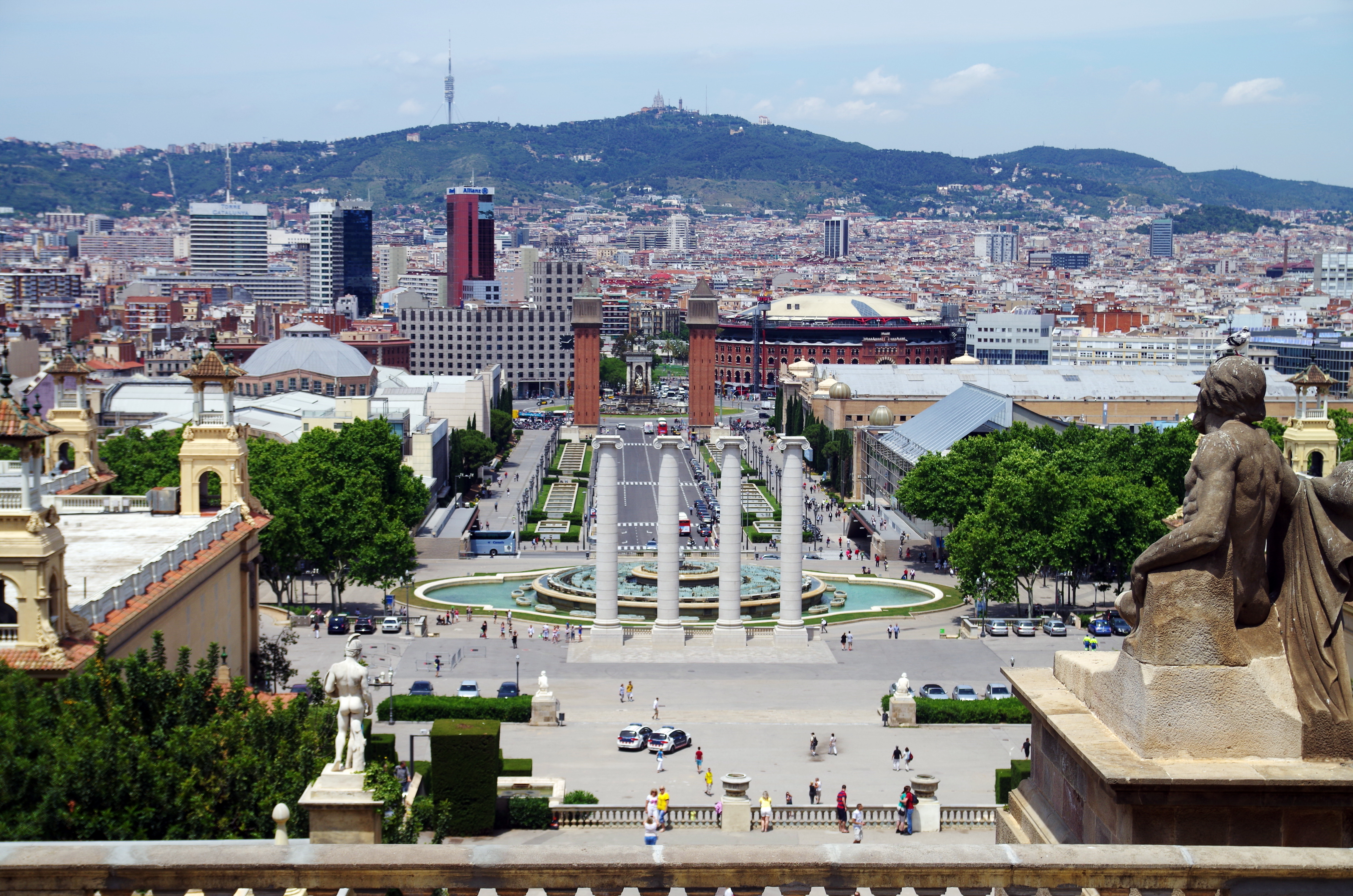 Blick vom Palau Nacional zur Paca Espanya